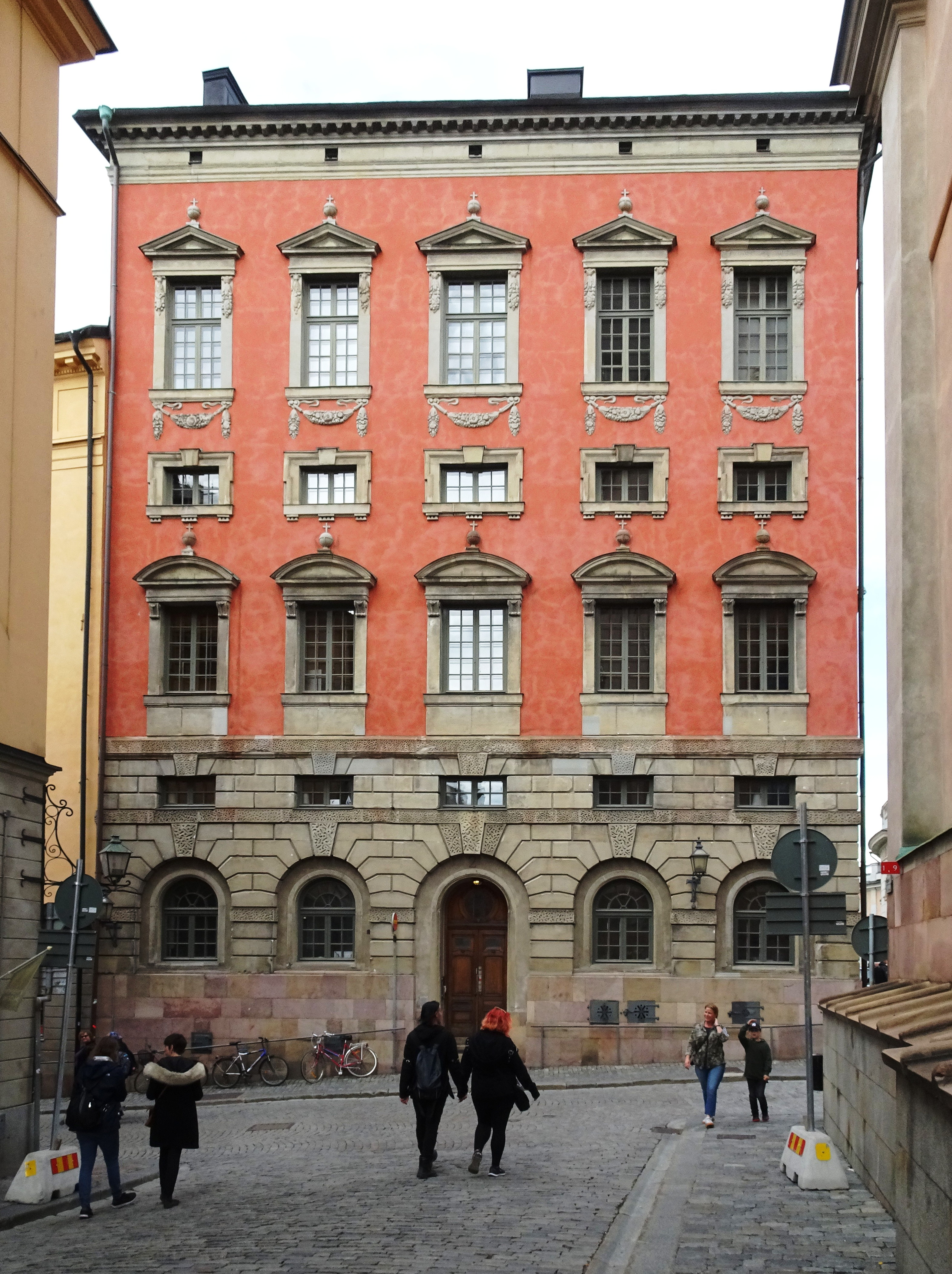 Axel Oxenstiernska palatset mot Trångsund